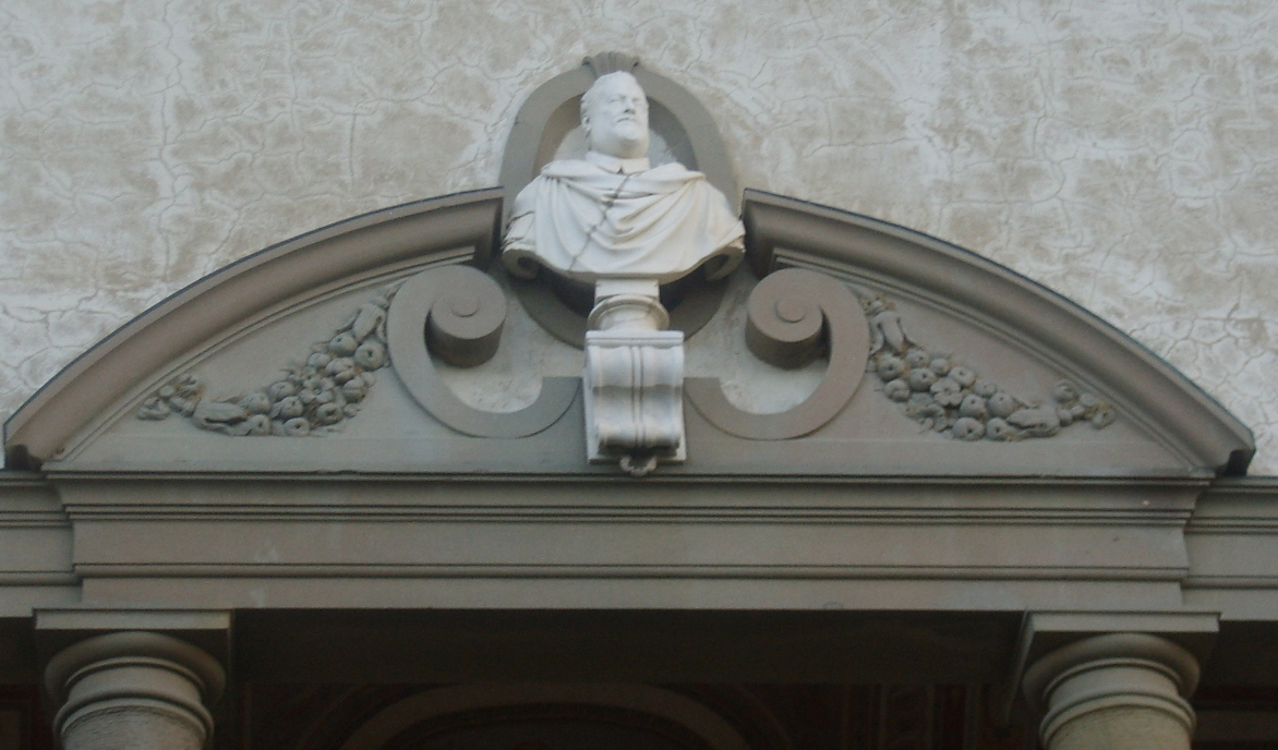 Villa di Artimino Busto of Ferdinando I de' Medici. Medicean villa in Artimino.